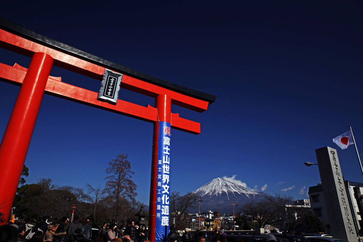 FujisanHonguSengenTaisha01.jpeg